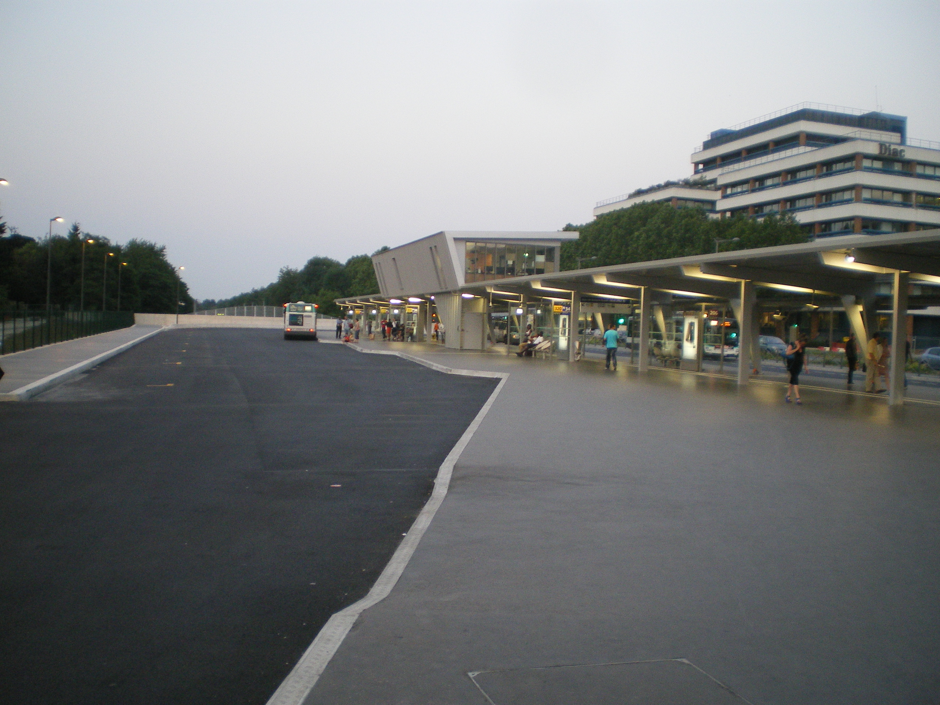 Gare de Noisy-le Grand-Mont-d'Est: Nouvelle gare routière